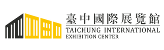 臺中國際展覽館標誌